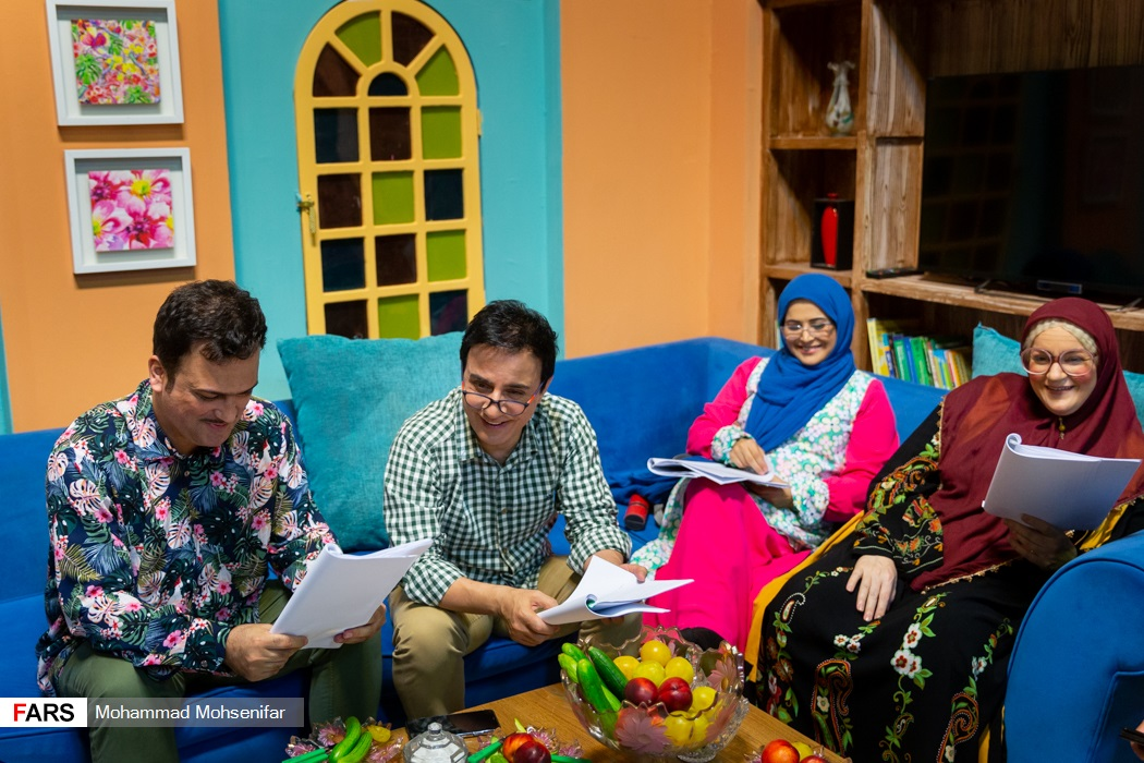 حامد آهنگی به همراه داریوش فرضیایی، نعیمه نظام دوست و کمند امیرسلیمانی در حال حفظ کردن دیالوگ در پشت صحنه بچه محل